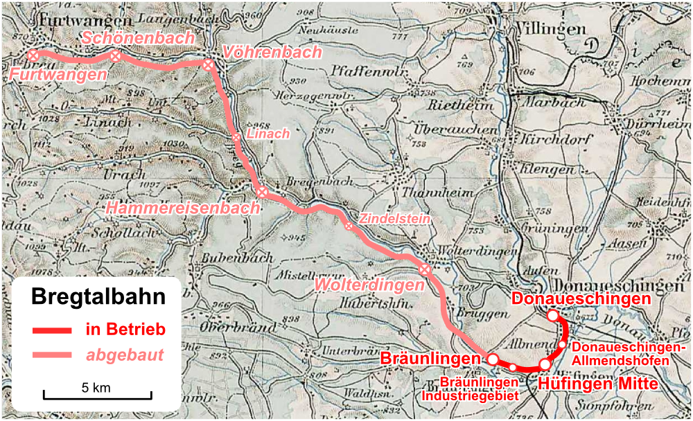 Verlaufskarte Bregtalbahn